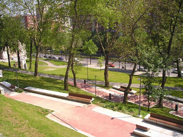 Bidarteko parkea Deustun.